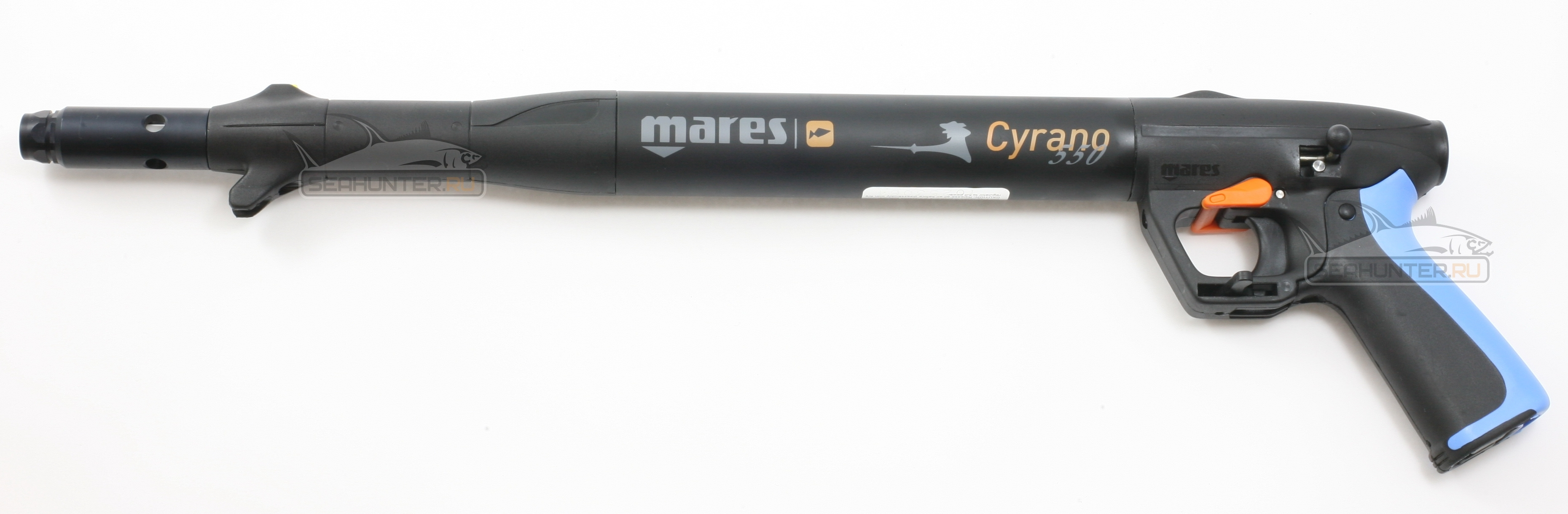 Пневматическое подводное ружье компании Mares модель Cyrano